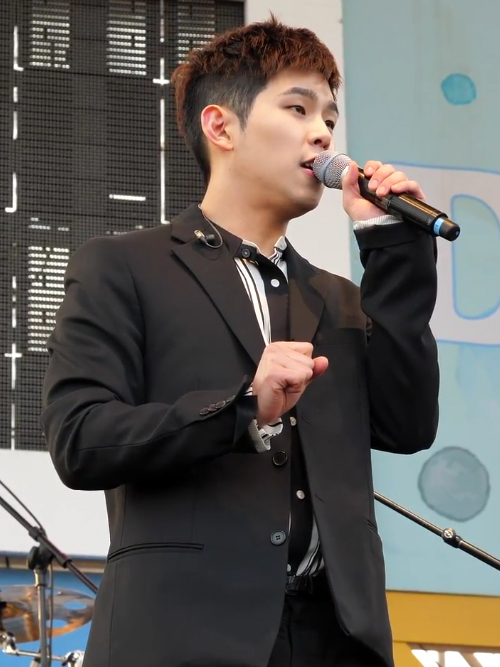 [직캠][4K 60P] 폴킴 - 커피 한 잔 할래요 [180415 2018 H.A.N.D 페스티벌] by.JAS